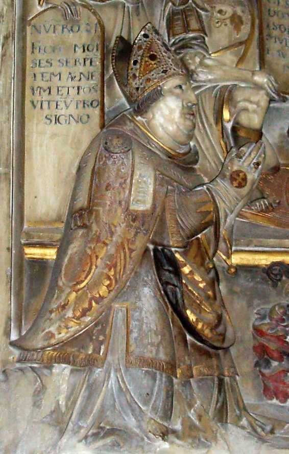 Martin von Schaumberg Bischof von Eichstätt, Reliefdarstellung auf Epitaphaltar im Eichstätter Dom